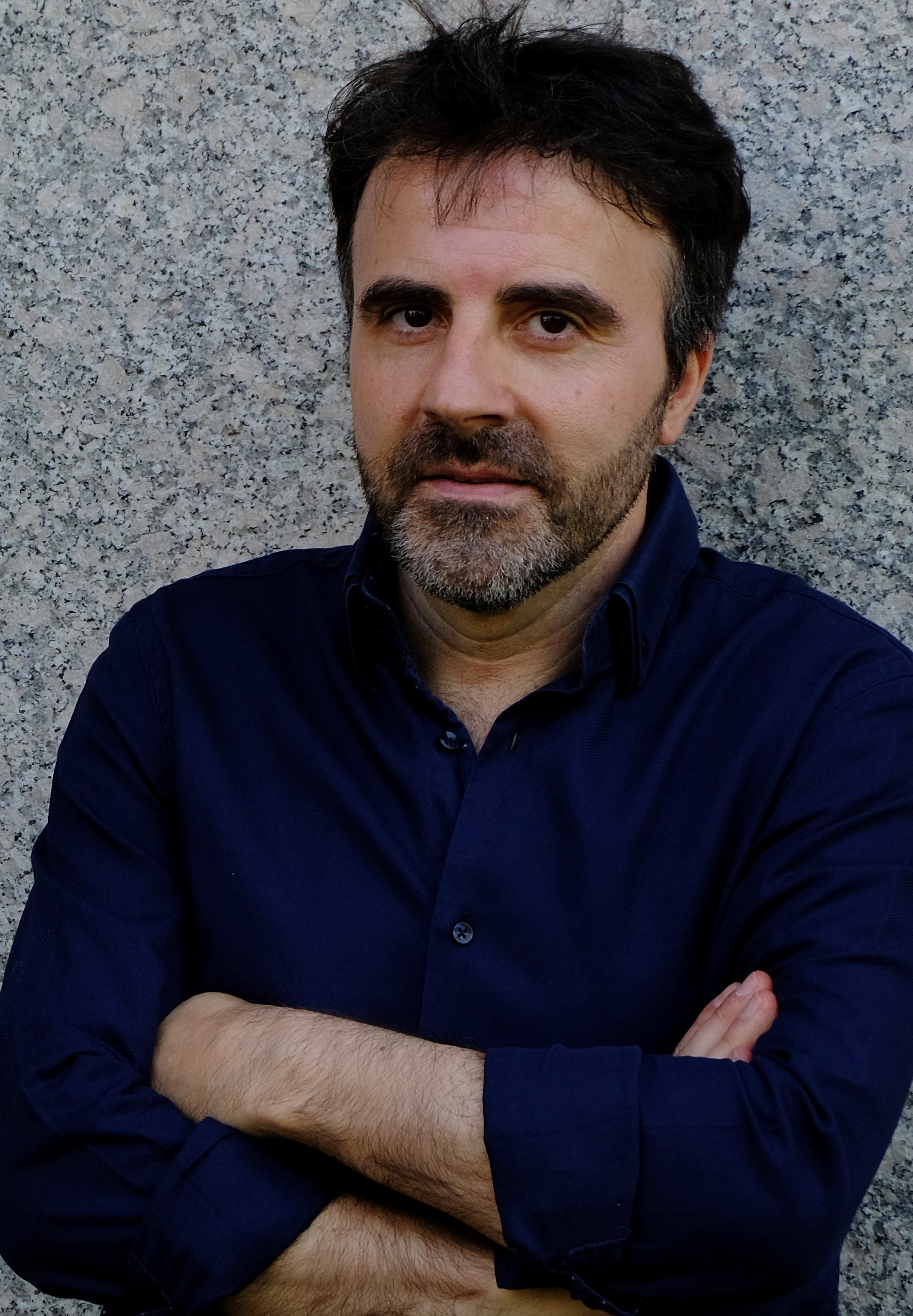 Foto del escritor.